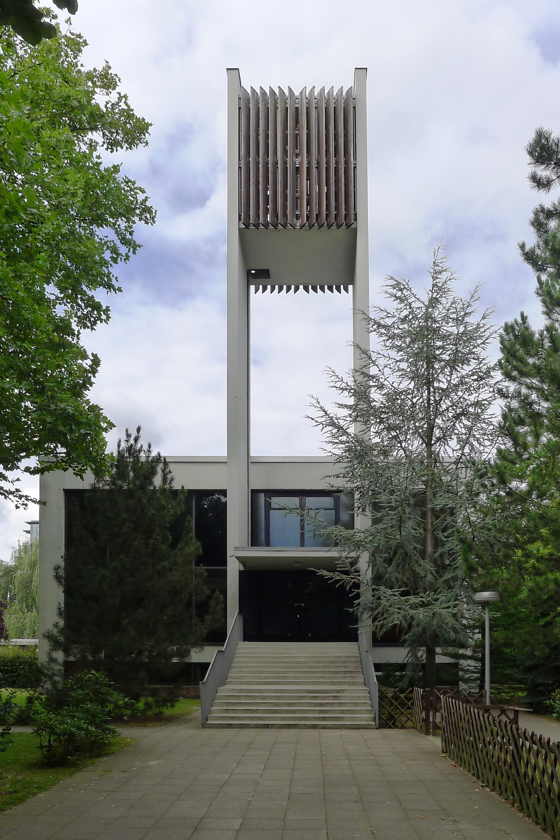 Glockenturm mit Freitreppe